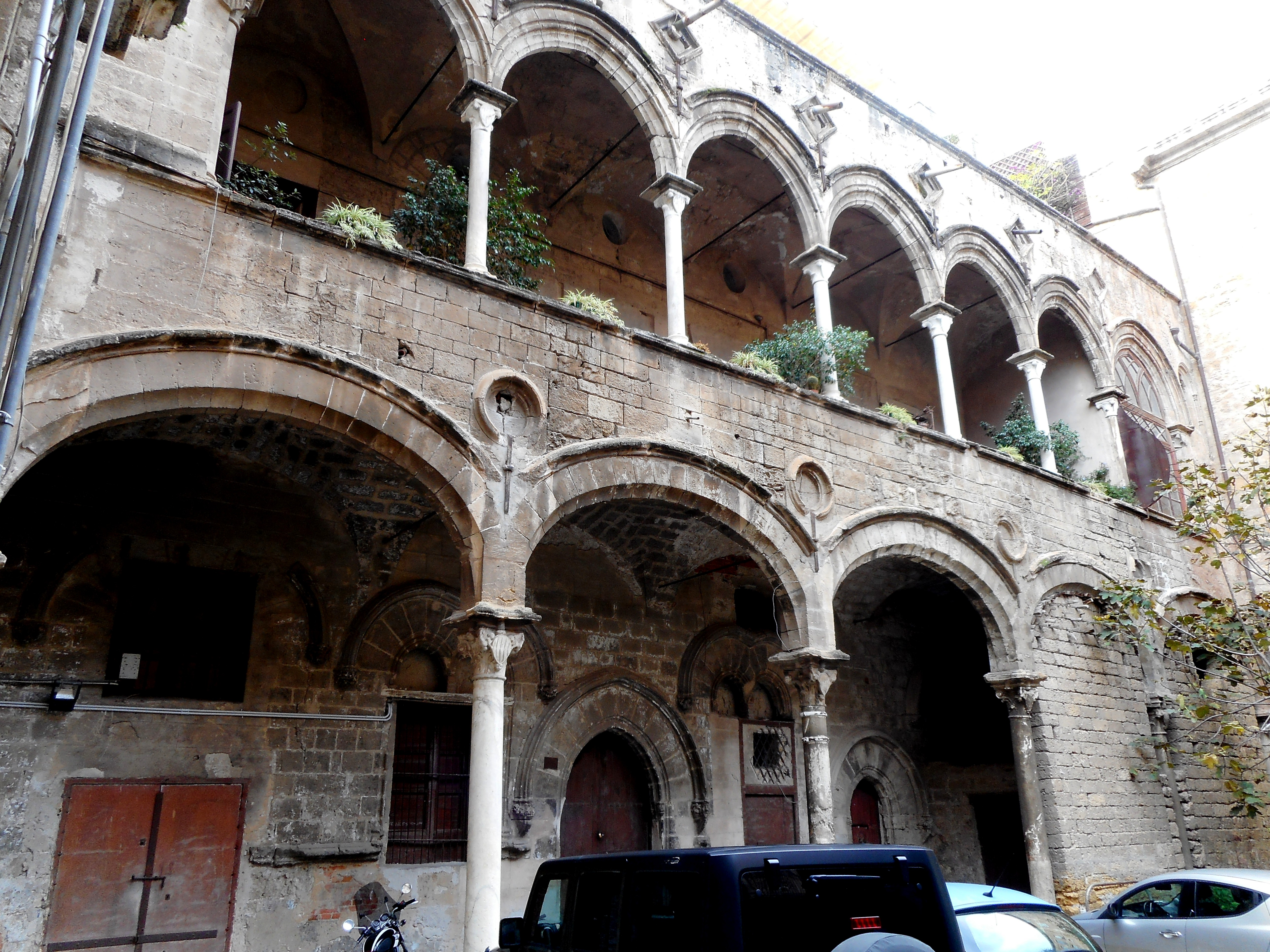 Cortile di Palazzo Aiutamicristo a Palermo opera di Matteo Carnelivari